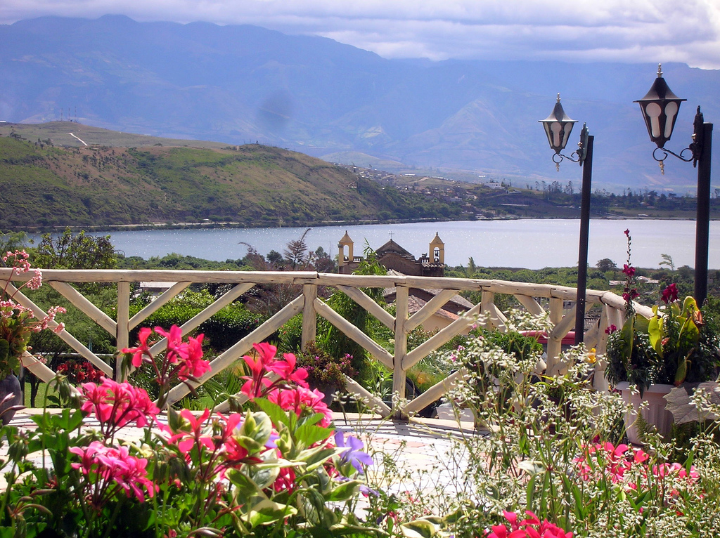 Quinta San Miguel Yahuarcocha Subido con el navegador Flock